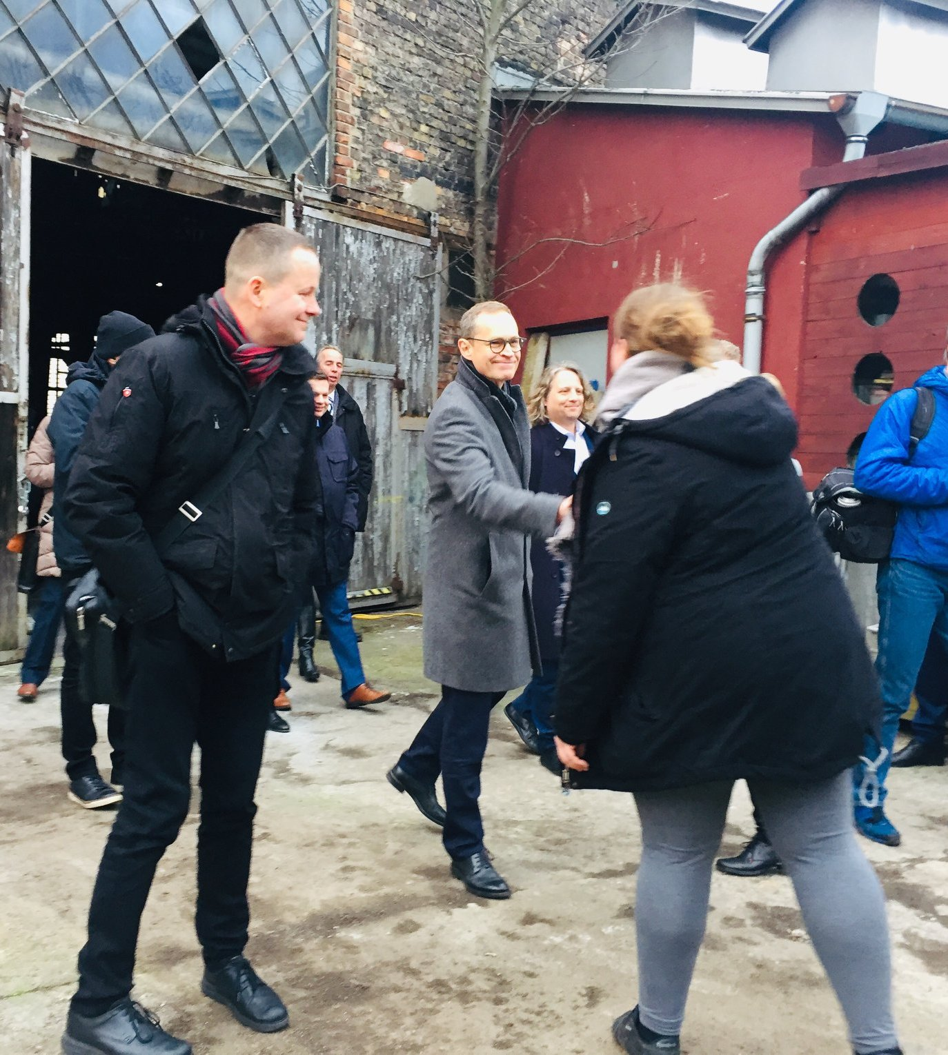 Senatsbesuch am 11.02.2020